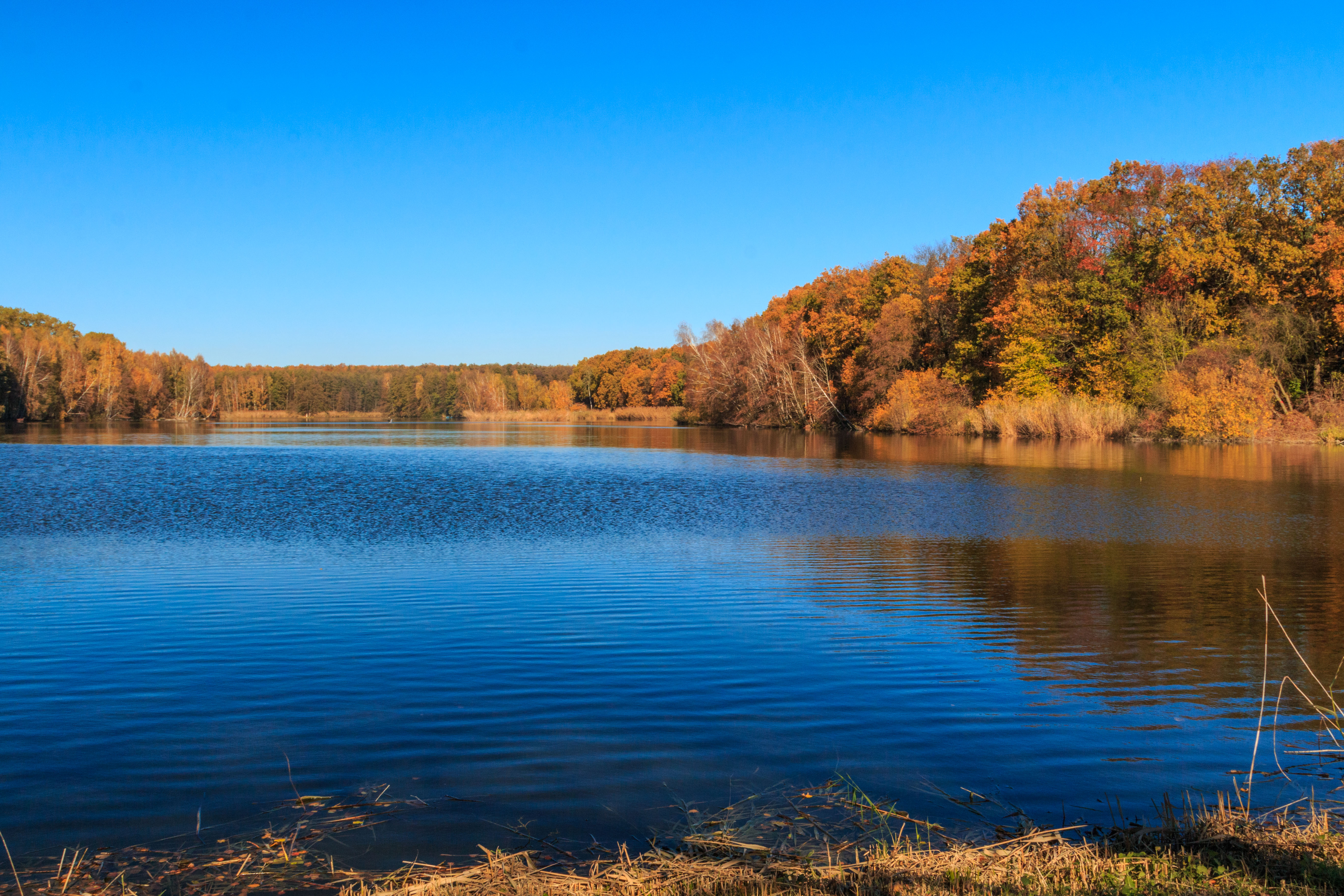 Rybník Hasina u Rožďalovic